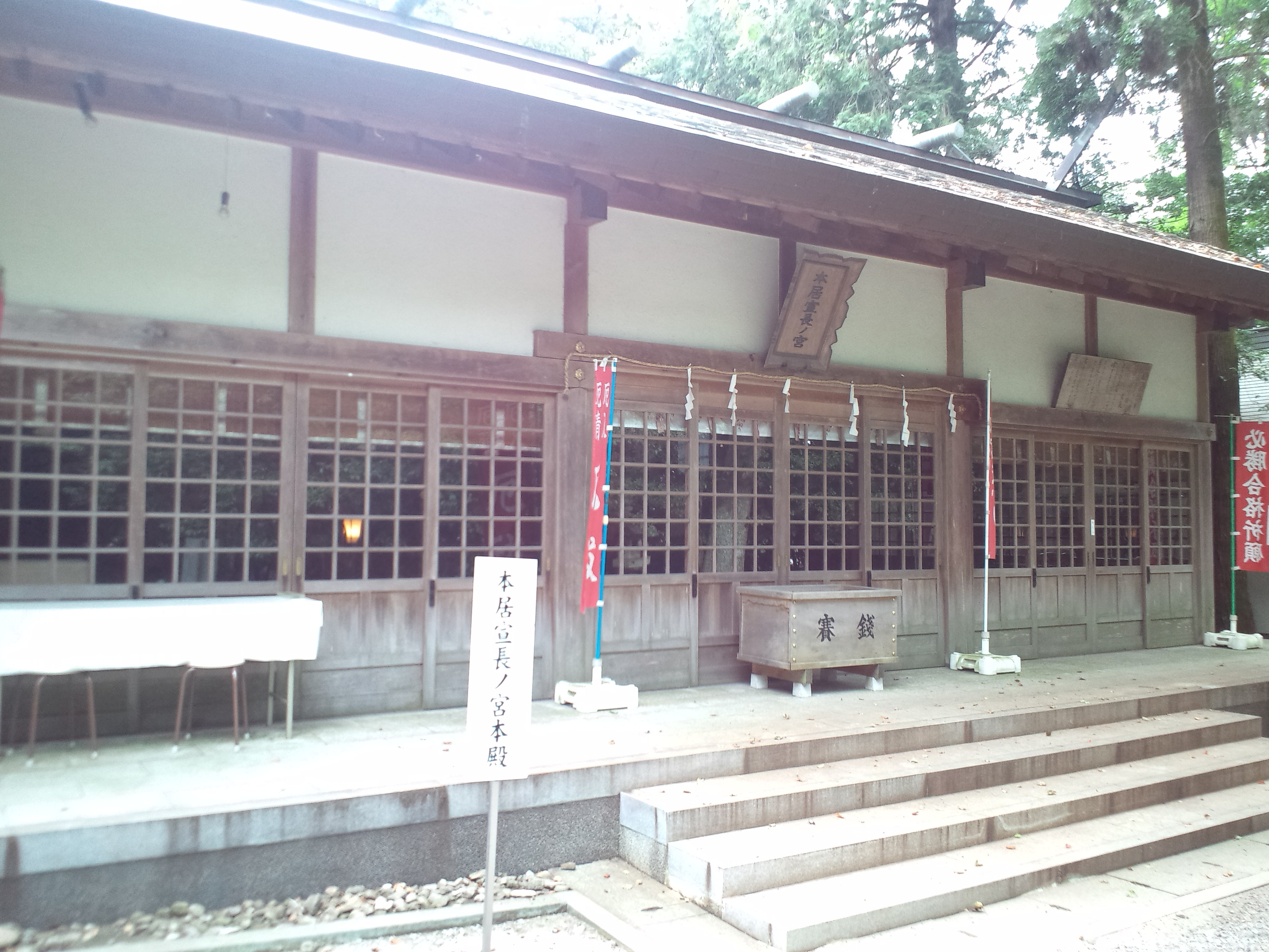 本居宣長ノ宮（拝殿）